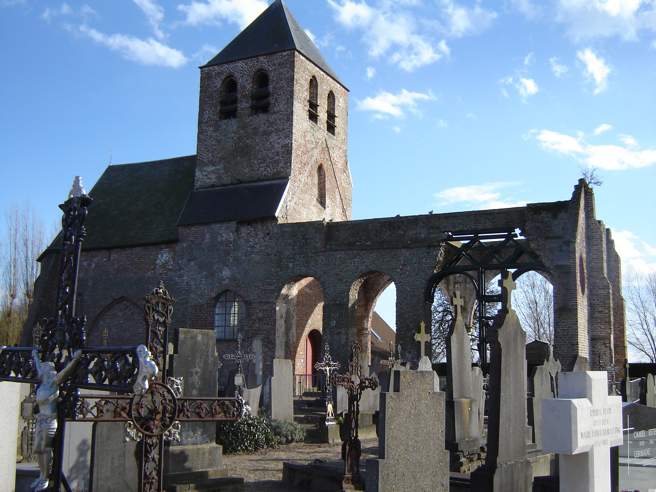 Sint-Eligiuskerk in Ettelgem (oud Romaans kerkje, gebruikt tot 1911)Church of Saint Eligius in Ettelgem (old romanesque church, used until 1911). In Ettelgem, Oudenburg, West Flanders, Belgium